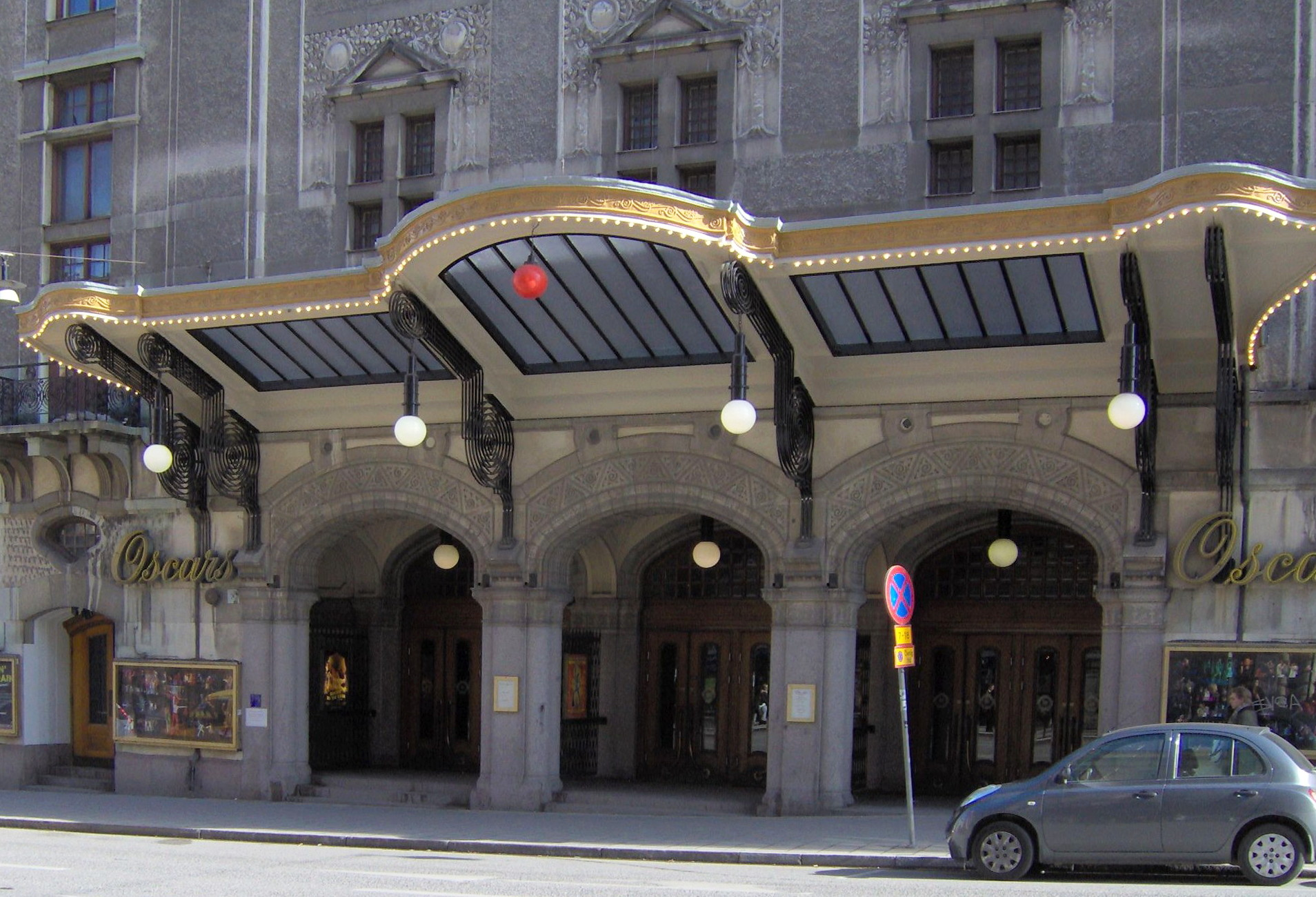 Oscarsteatern Stockholm, Sverige. år 2006 Oscars theatere, Stockholm, Sweden Year 2006.